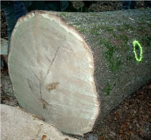 Traubeneichenstamm in Furnierqualität aus dem Spessart